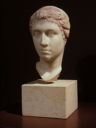 Kleopatra VII. Altes Museum Berlin.